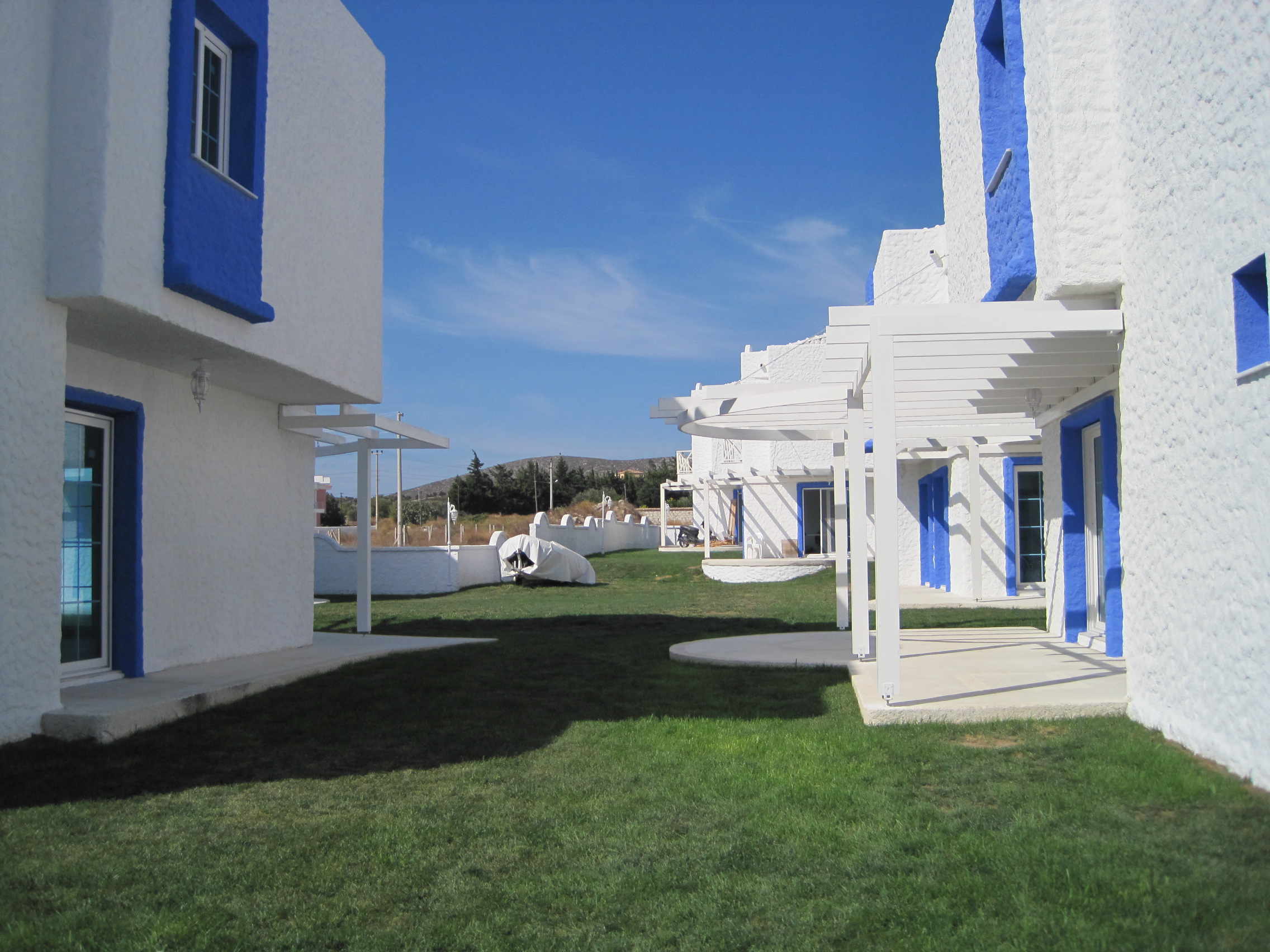 Fevzi Cakmak, 35930 Alaçatı/Çeşme/İzmir, Turkey